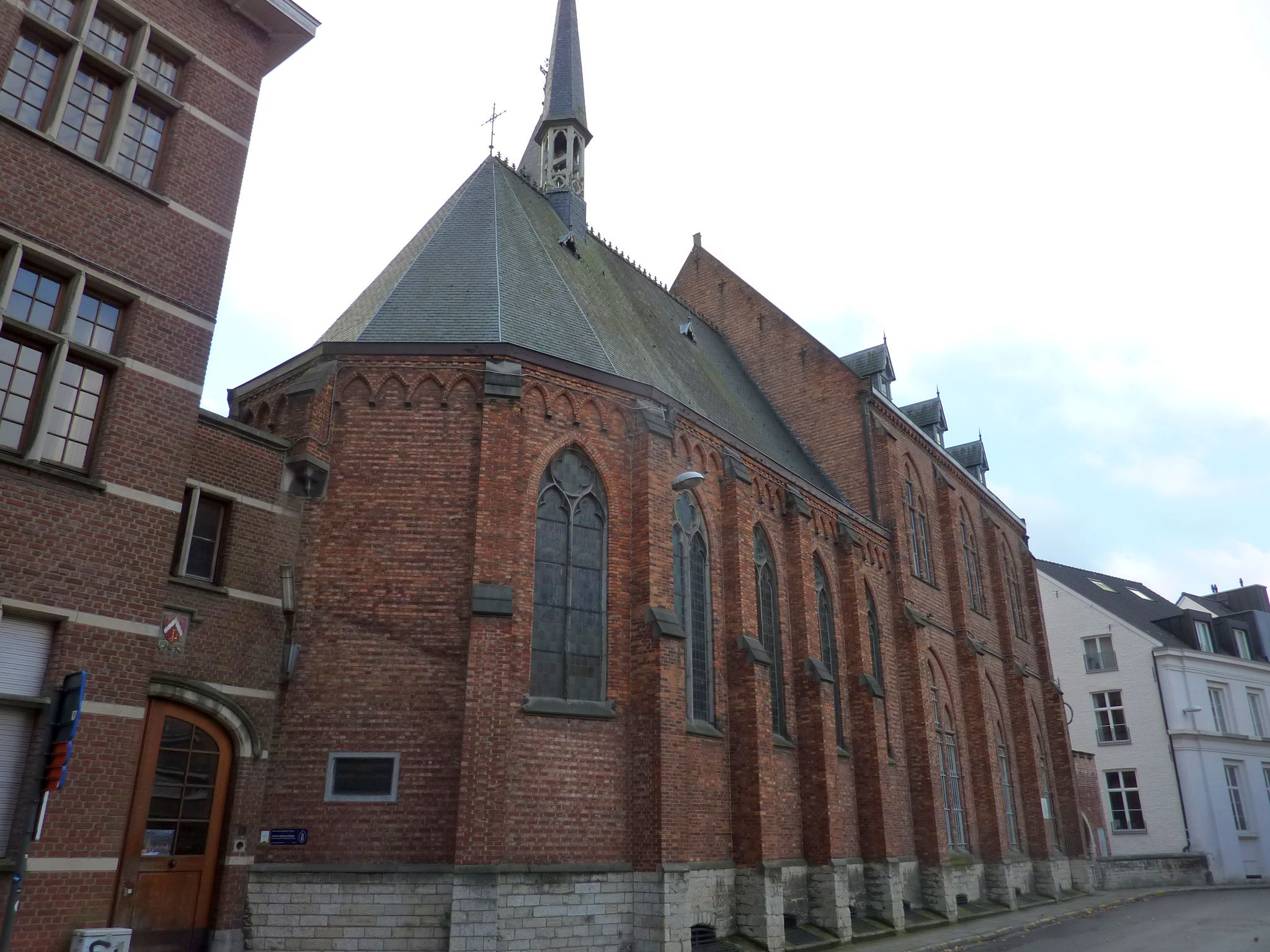 Kapel Justus Lipsiuscollege, Leuven